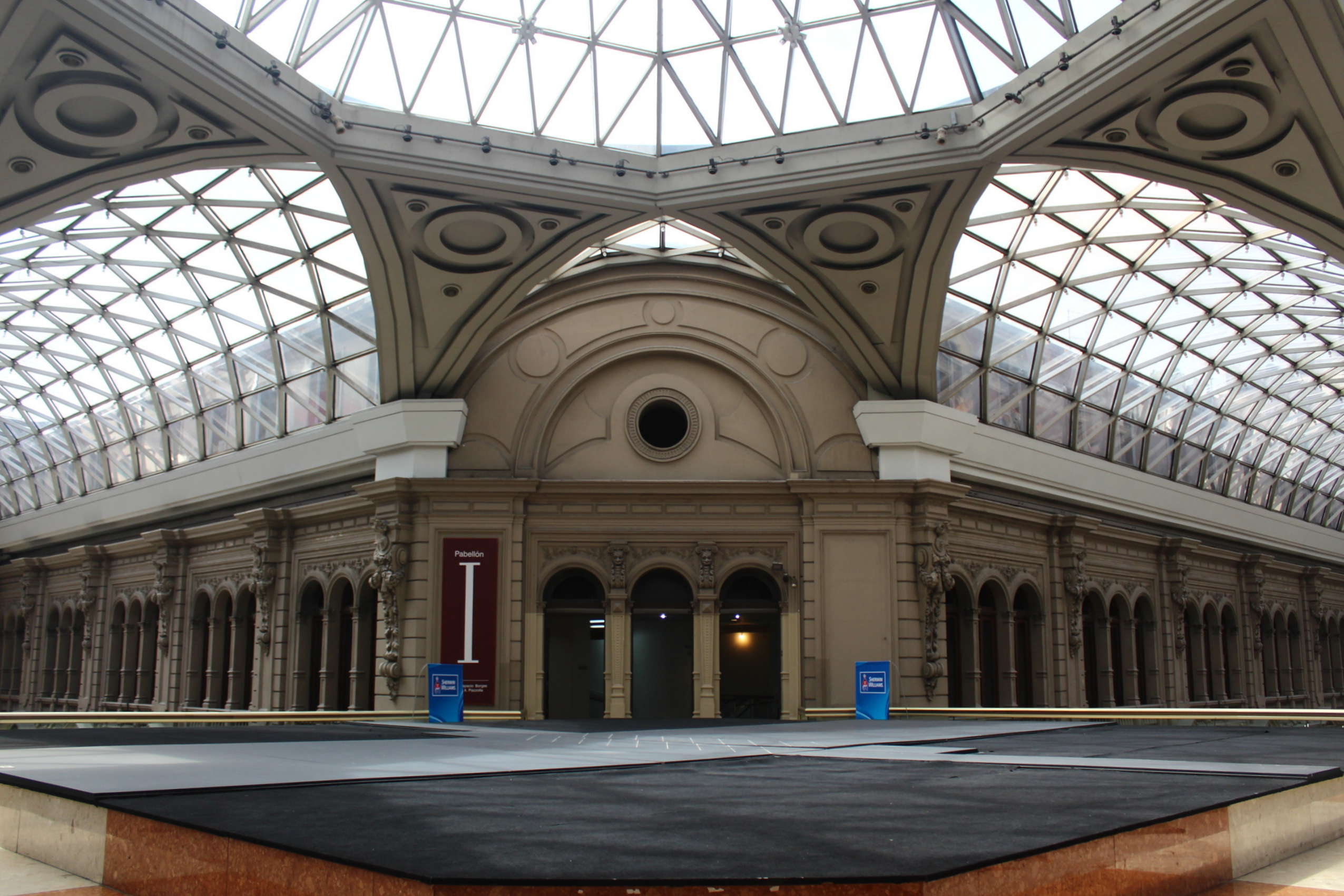 Pavilhão I do Centro Cultural Borges - Espacio Borges. Centro Cultural Borges, em Buenos Aires, Argentina.